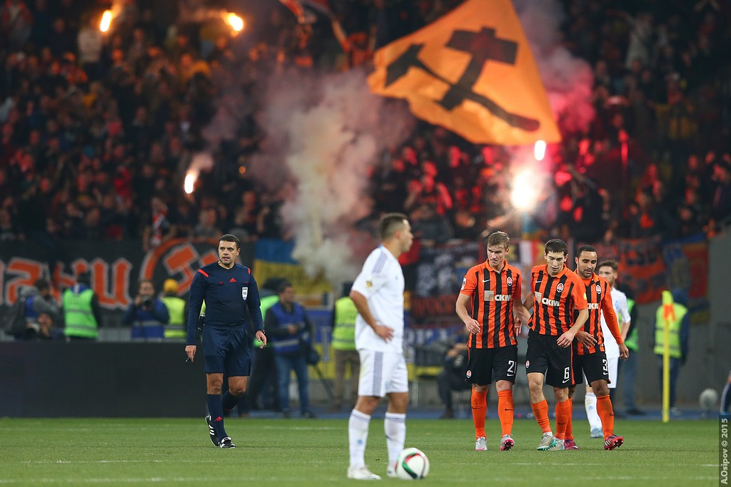 16.10.2015 г.Киев. НСК "Олимпийский". 11-й тур Лиги Пари-Матч. Динамо Киев - Шахтер Донецк - 0:3